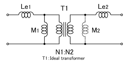 Transformer equivalent circuit